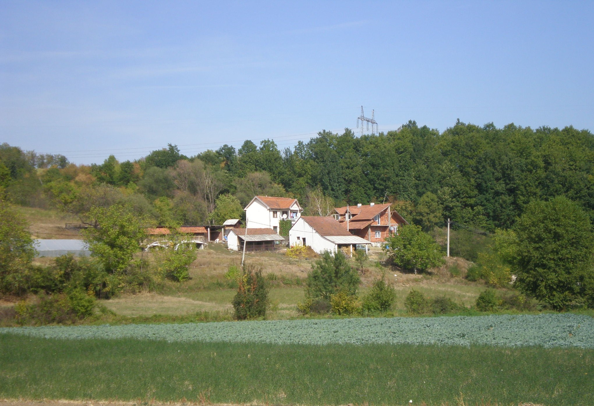 Слатинска Бања